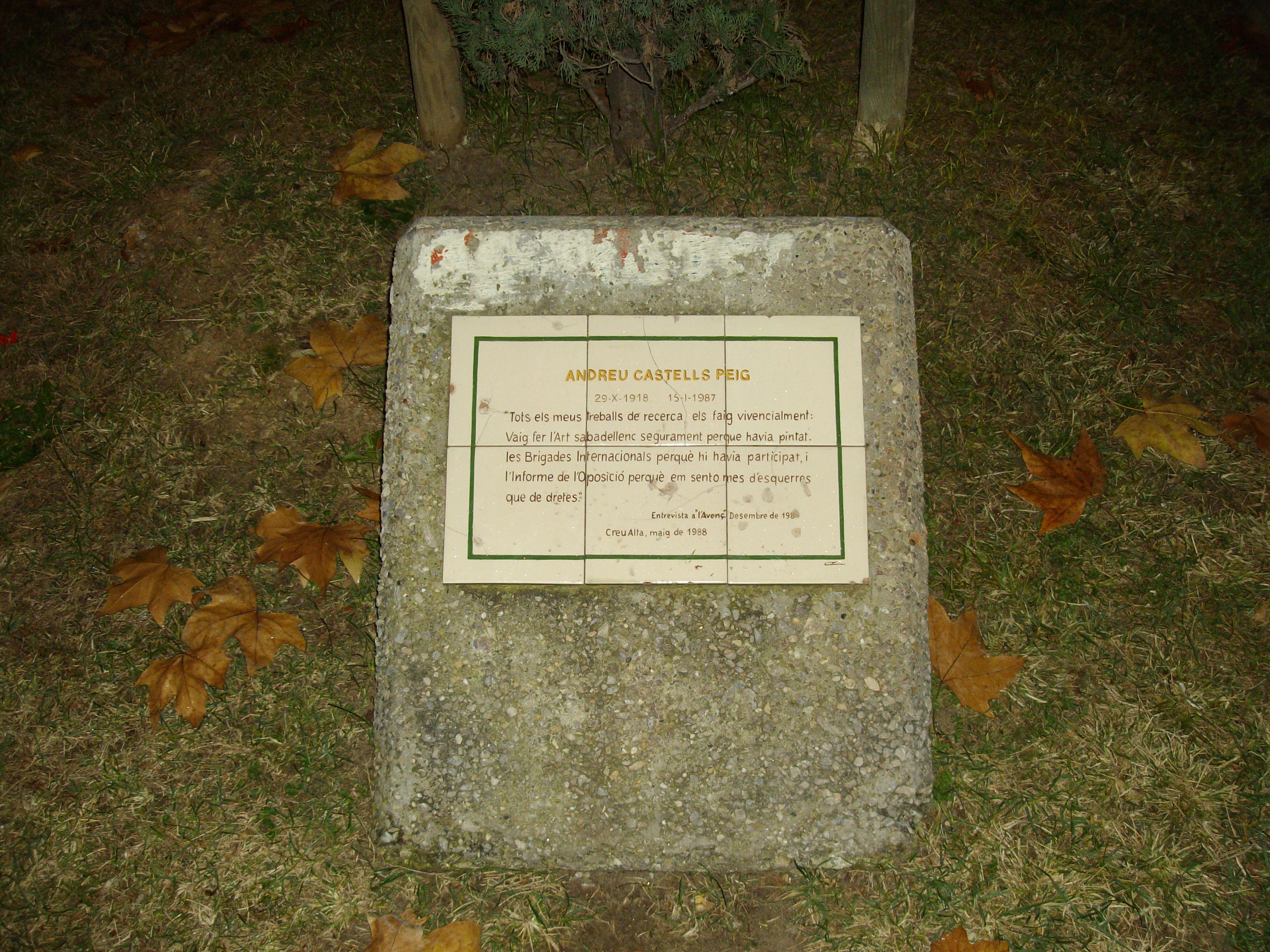 Monumento en recuerdo de Andreu Castells Peig, pintor, historiador y editor sabadellense, erigido en mayo de 1988 en la plaza de la Creu Alta, en Sabadell, Barcelona (España).